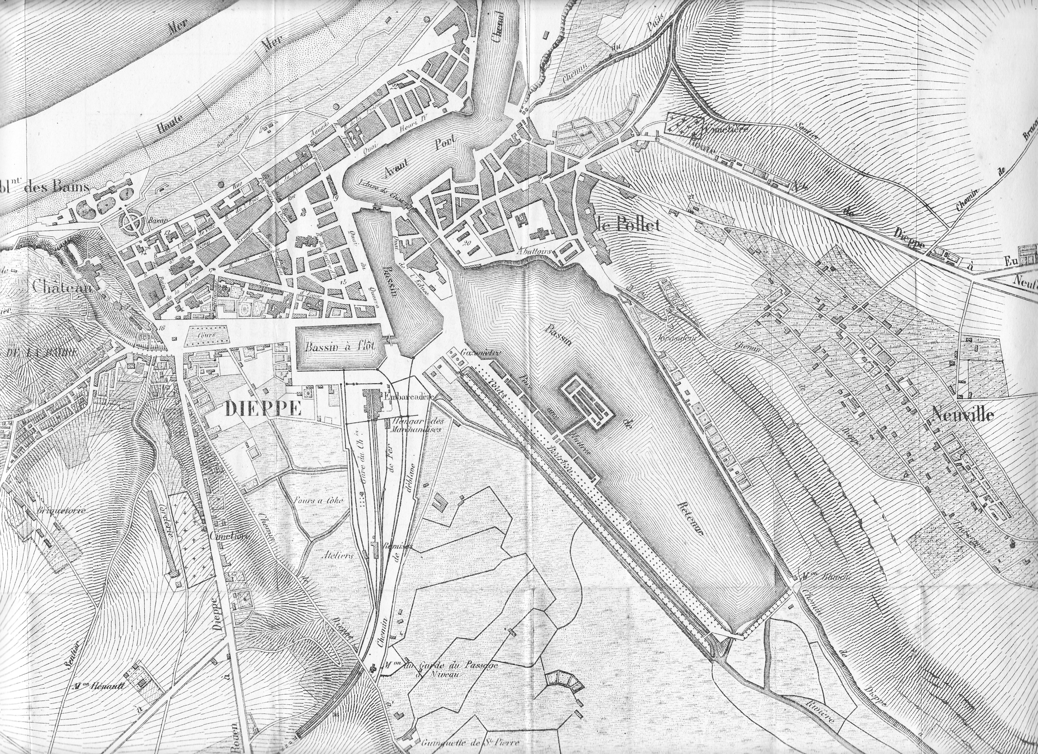 Plan de la ville Dieppe avec la gare de chemin de fer.